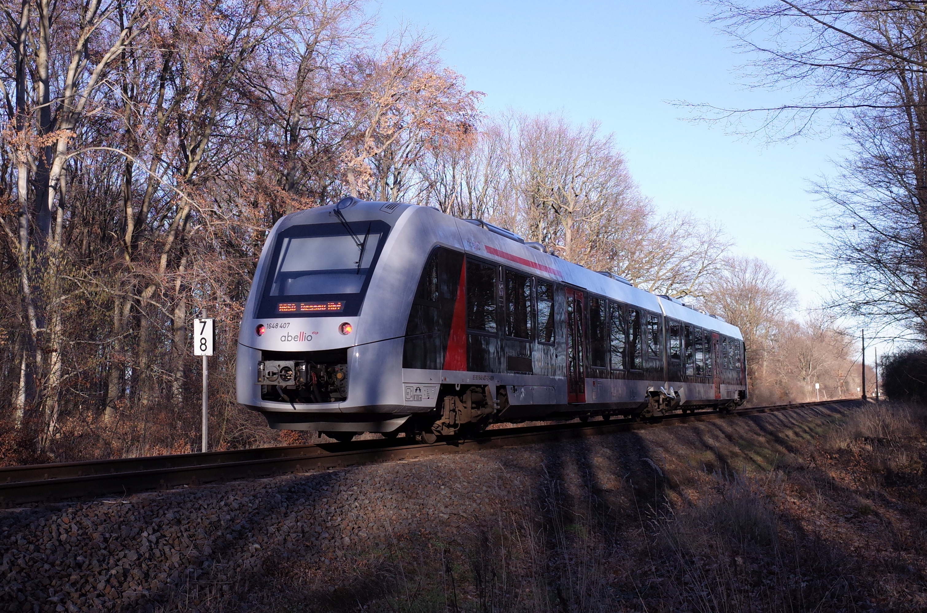 Dessau-Roßlau, Ortsteil Mosigkau. Zug von Abellio auf der Bahnstrecke Dessau–Köthen im Naturschutzgebiet Rößling .